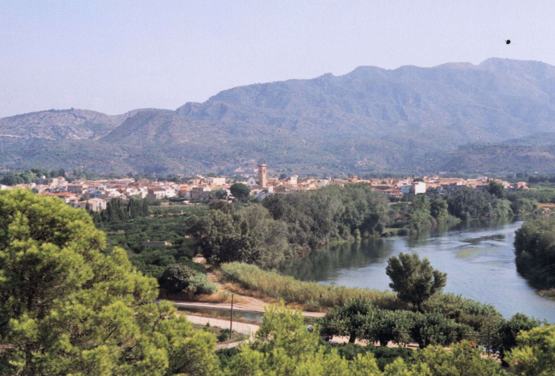 Vista parical de la vila de Xerta i el riu Ebre.